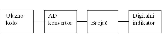 Blok šema digitalnog voltmetra za jednosmjerni napon. (Ja sam autor ove slike, koristim je za seminarski rad i predajem je u javno vlasništvo).